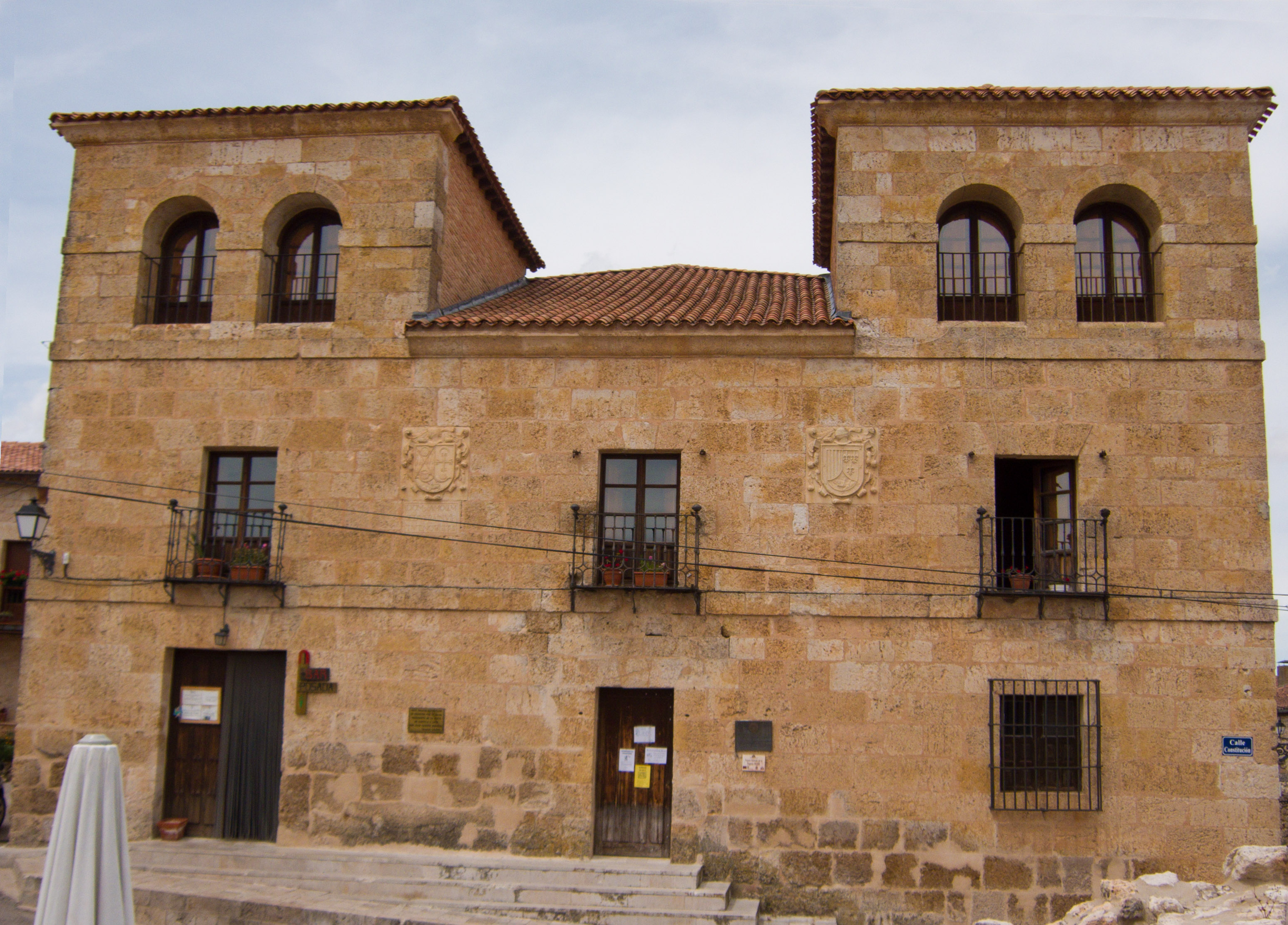 Palacio de Guzmán y Santoyo (Guzmán)